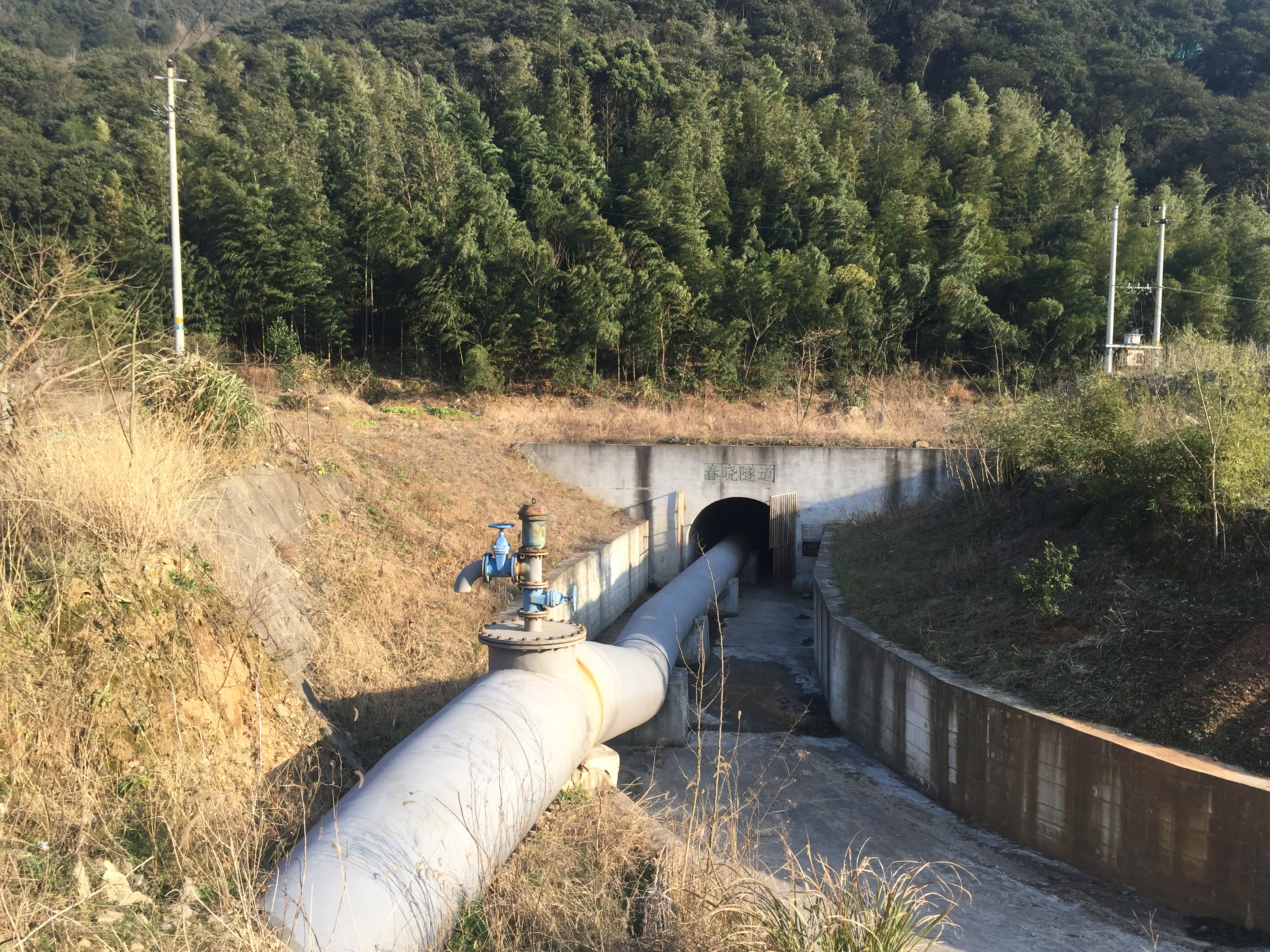 中文（中国大陆）: 春晓隧道远景